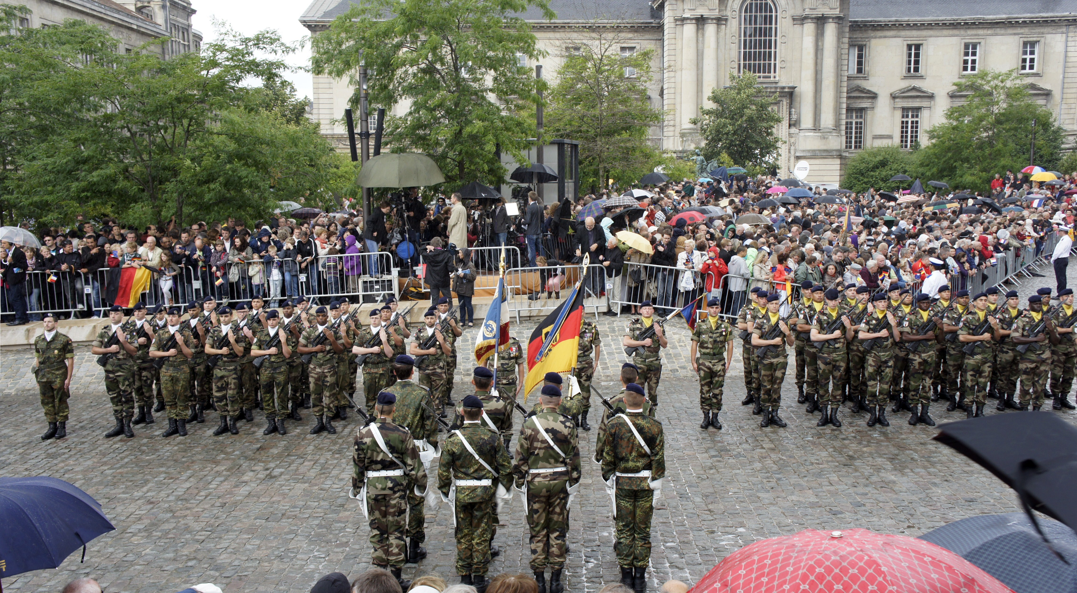 La brigade franco-allemande en parade à Reims pour les 50 ans de l'amitiée franco allemande.